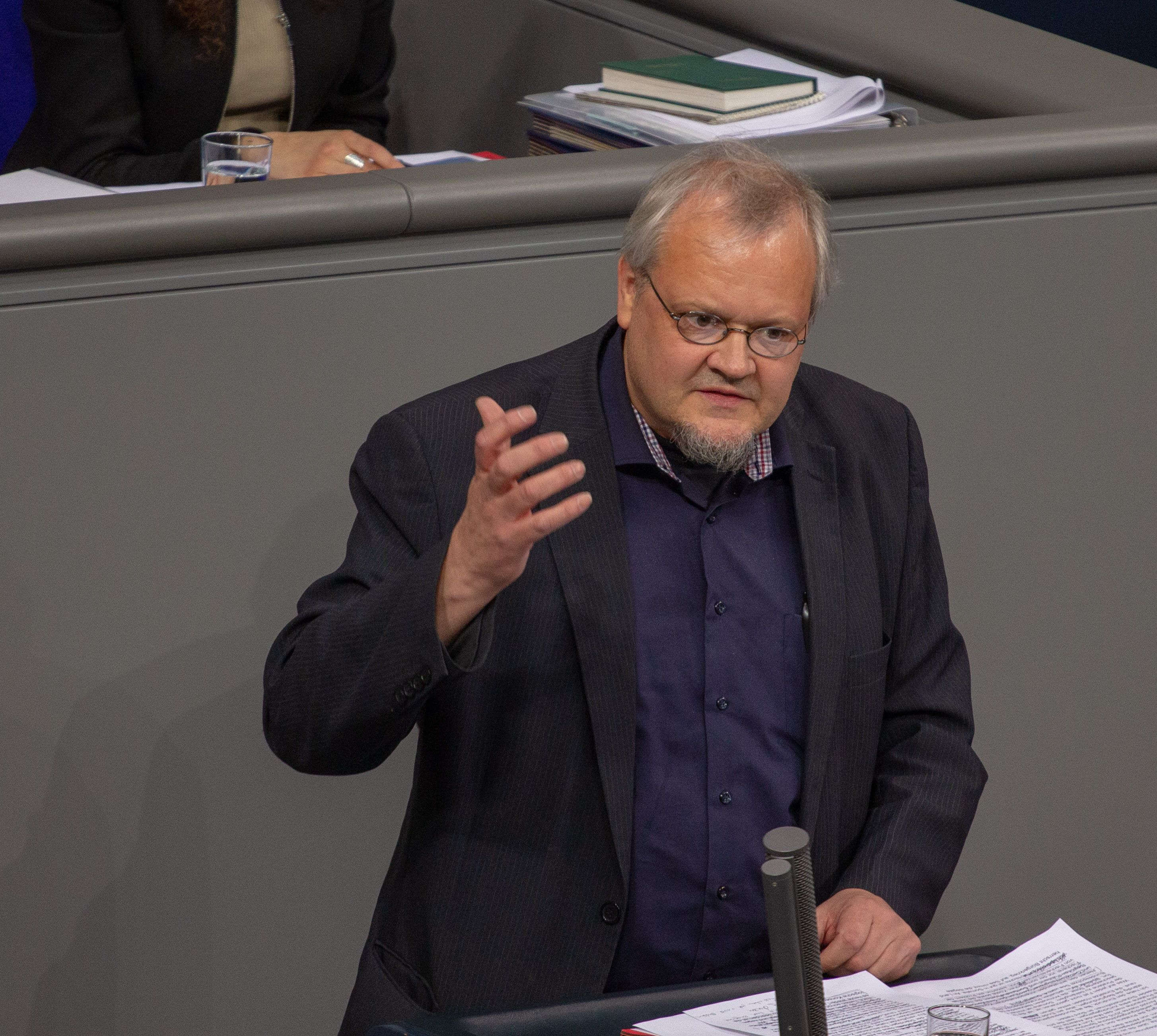 Tobias Pflüger, Mitglied des Deutschen Bundestages, während einer Plenarsitzung am 11. April 2019 in Berlin.